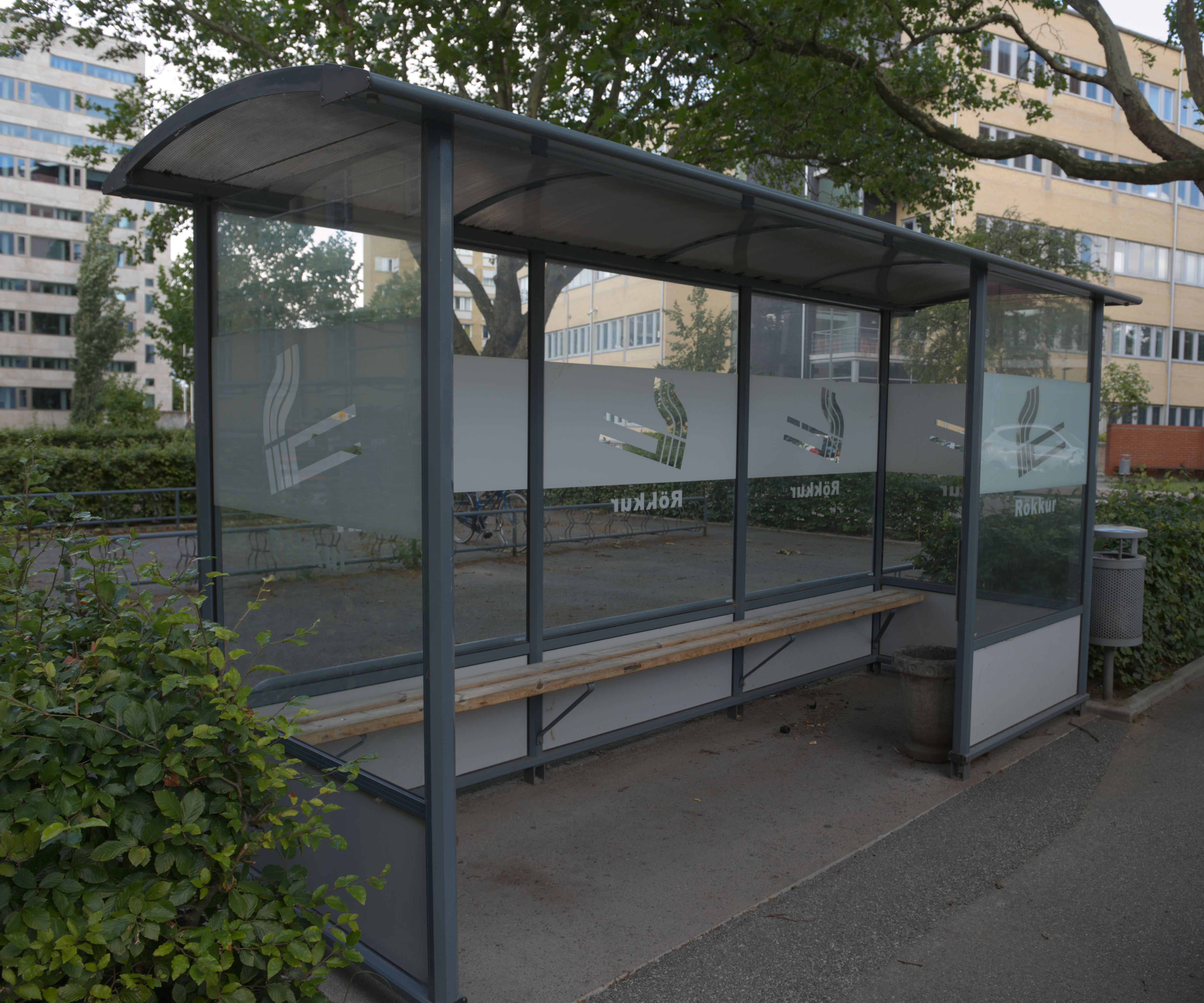 Rökkur på sjukhusområdet i Malmö.